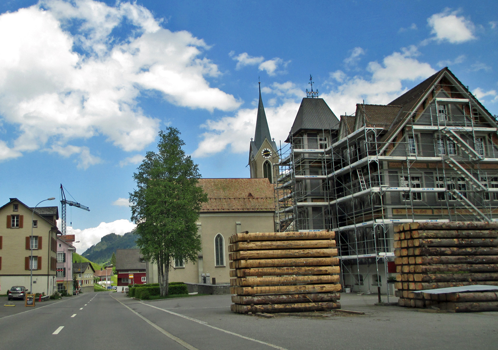 Dorfkern von Alpthal SZ, Schweiz